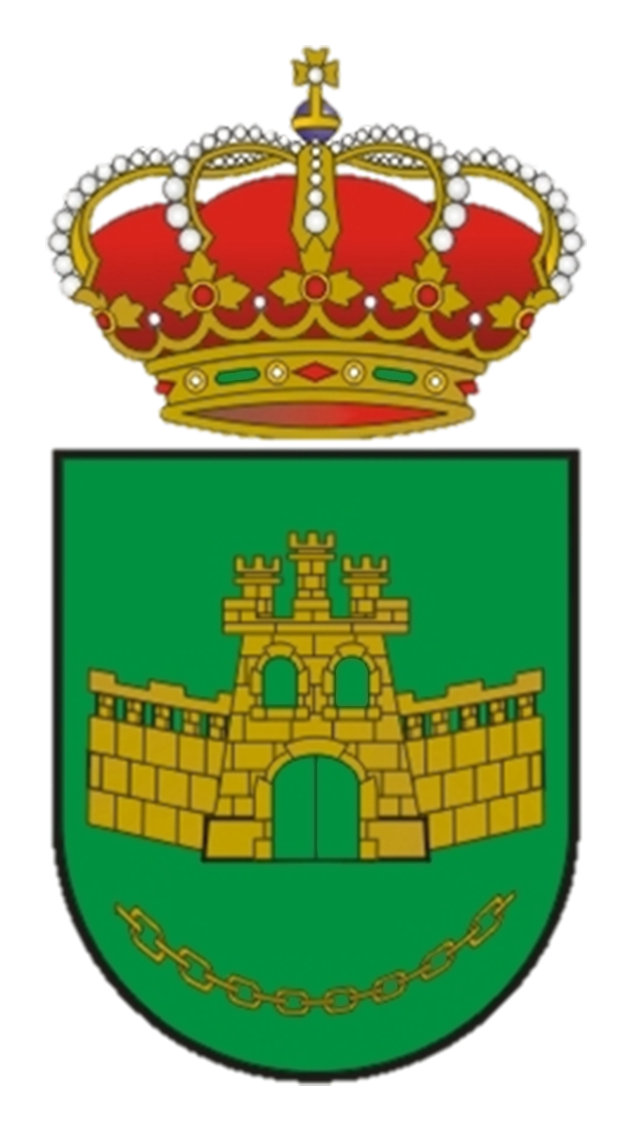 Escudo de Arjonilla